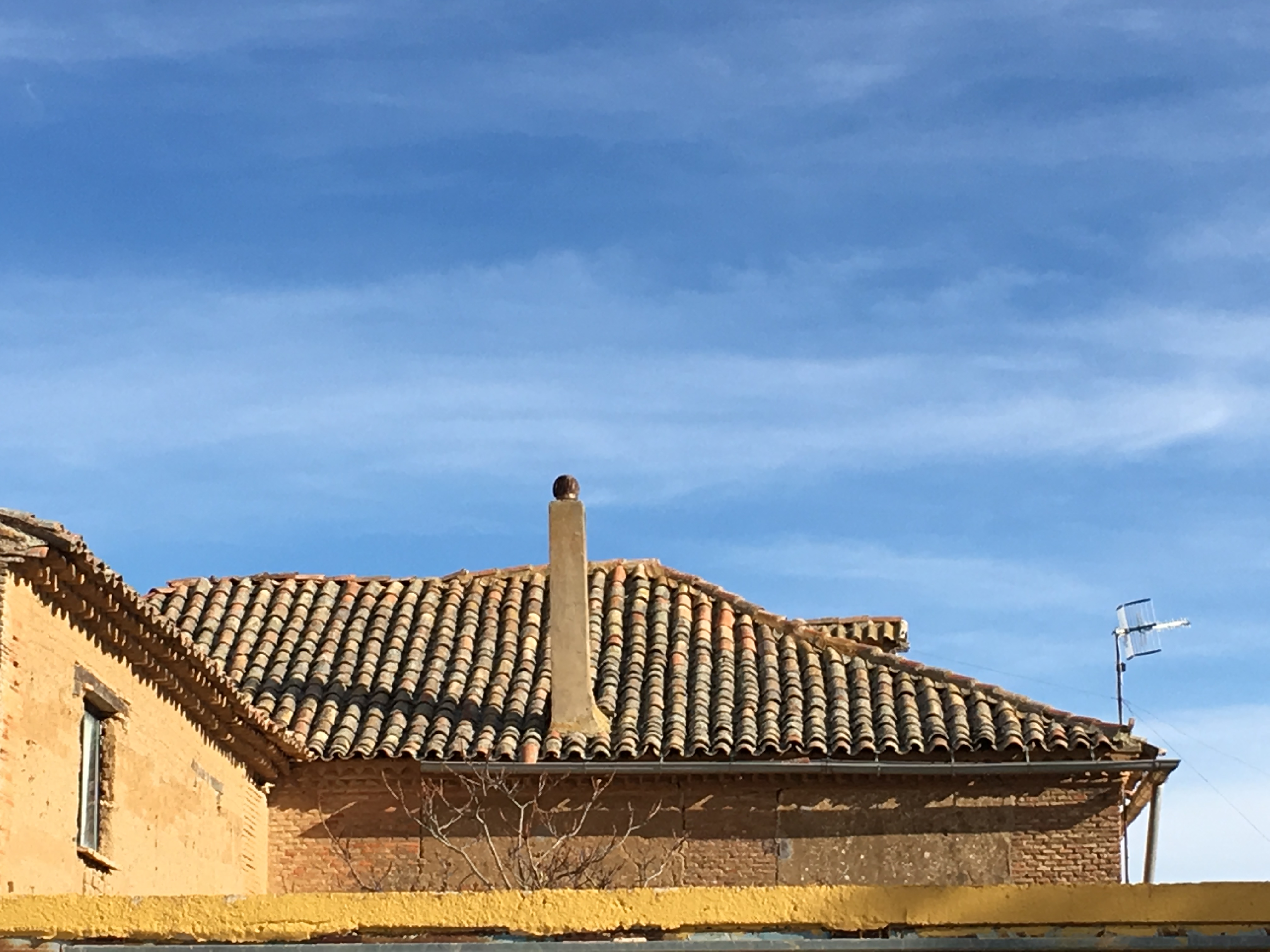 Villaesper Milenario